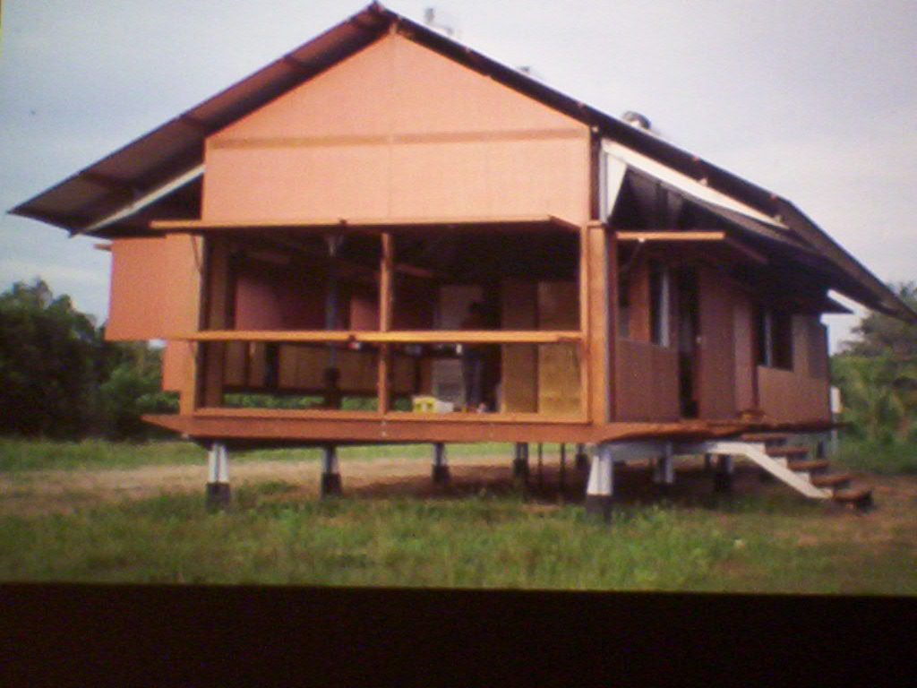 Glenn Murcutt, diapositiva en el III Encuentro de Arquitectura y Urbanismo Tropical, Costa Rica 2004